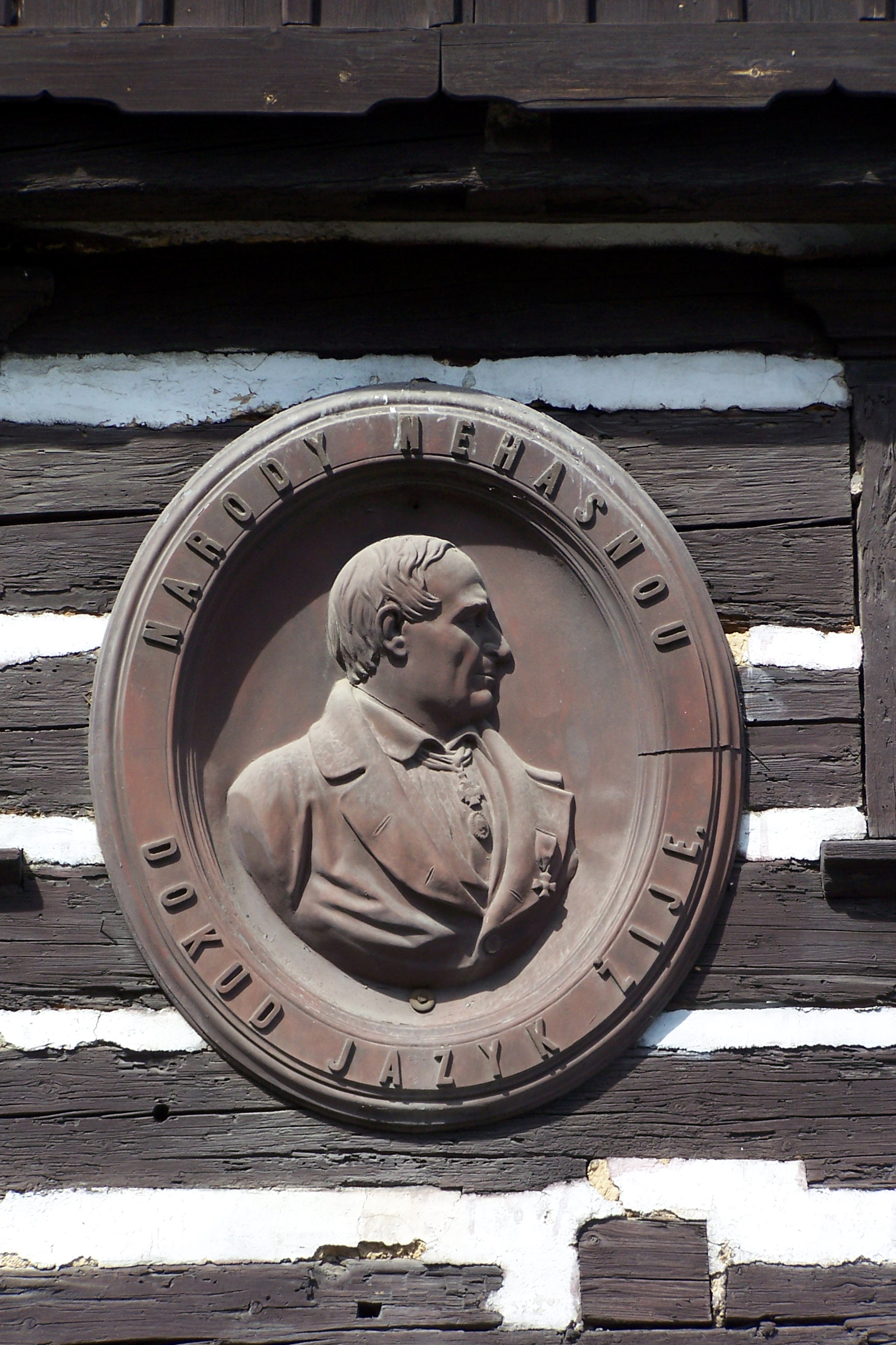 Česky: Hořiněves - Rodný dům Václava Hanky. Loc: 50°18'43.018"N, 15°45'53.105"E